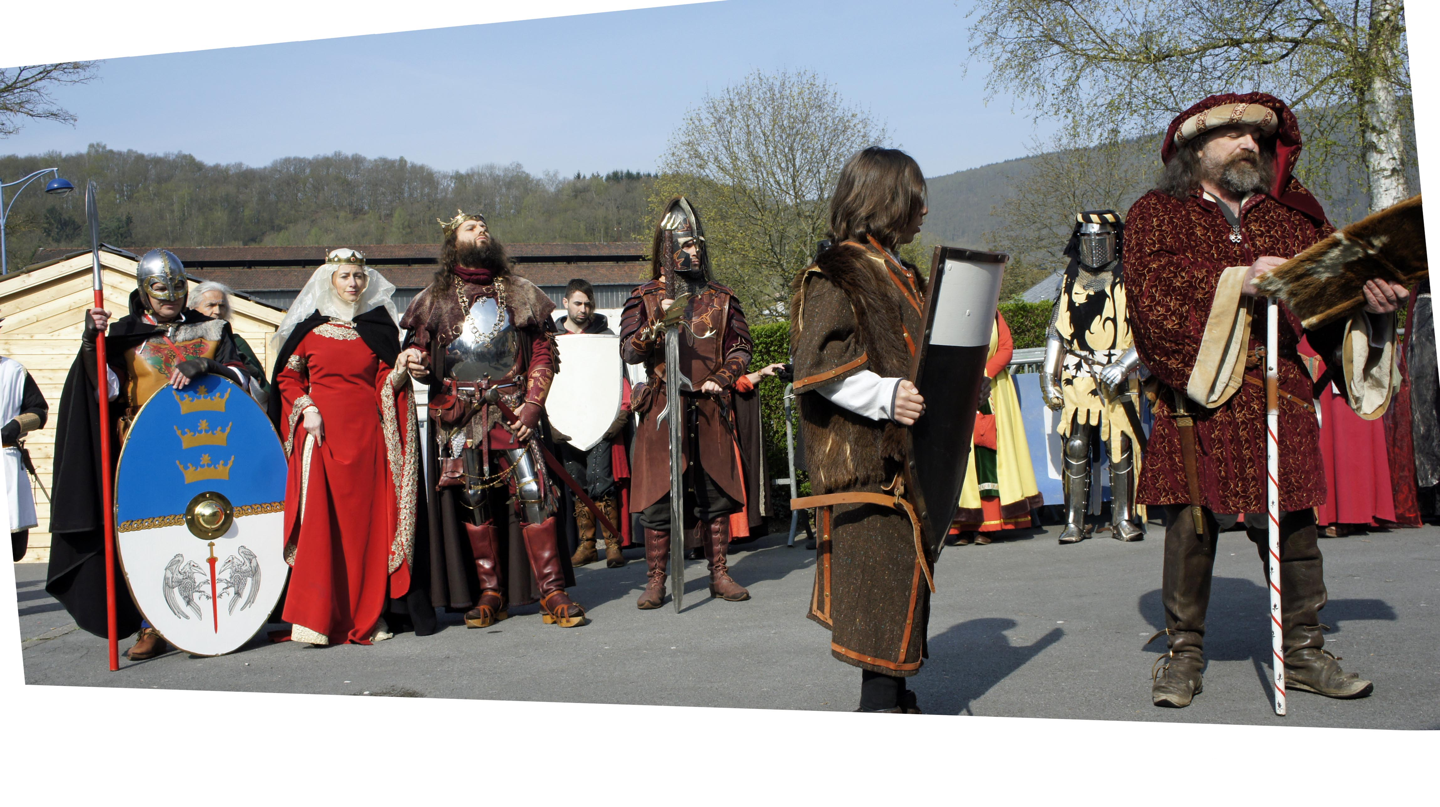 Keu le sénéchal présentant la cour de Bretagne .